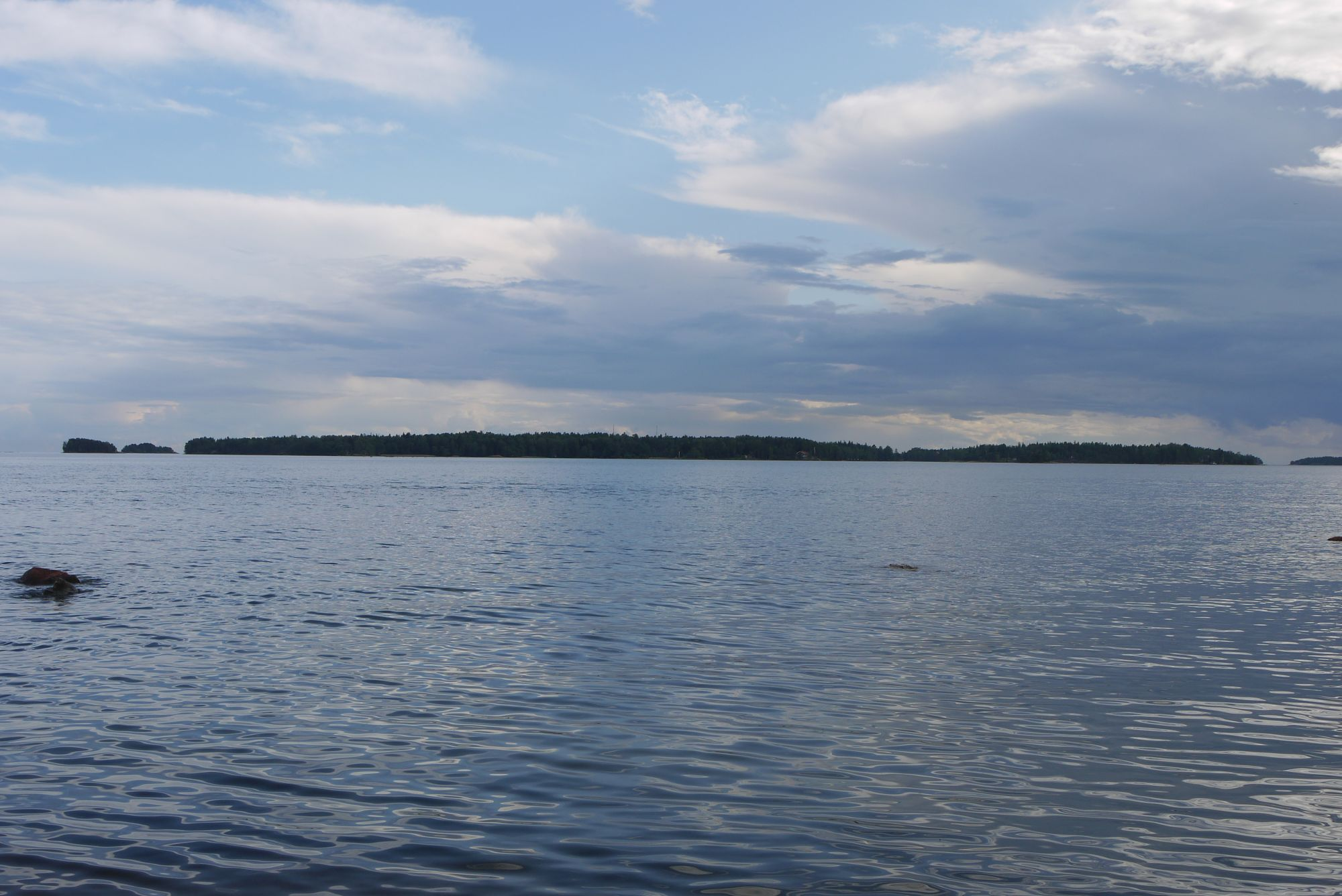 Miessaari Haukilahden rannalta nähtynä